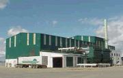 Transalfals